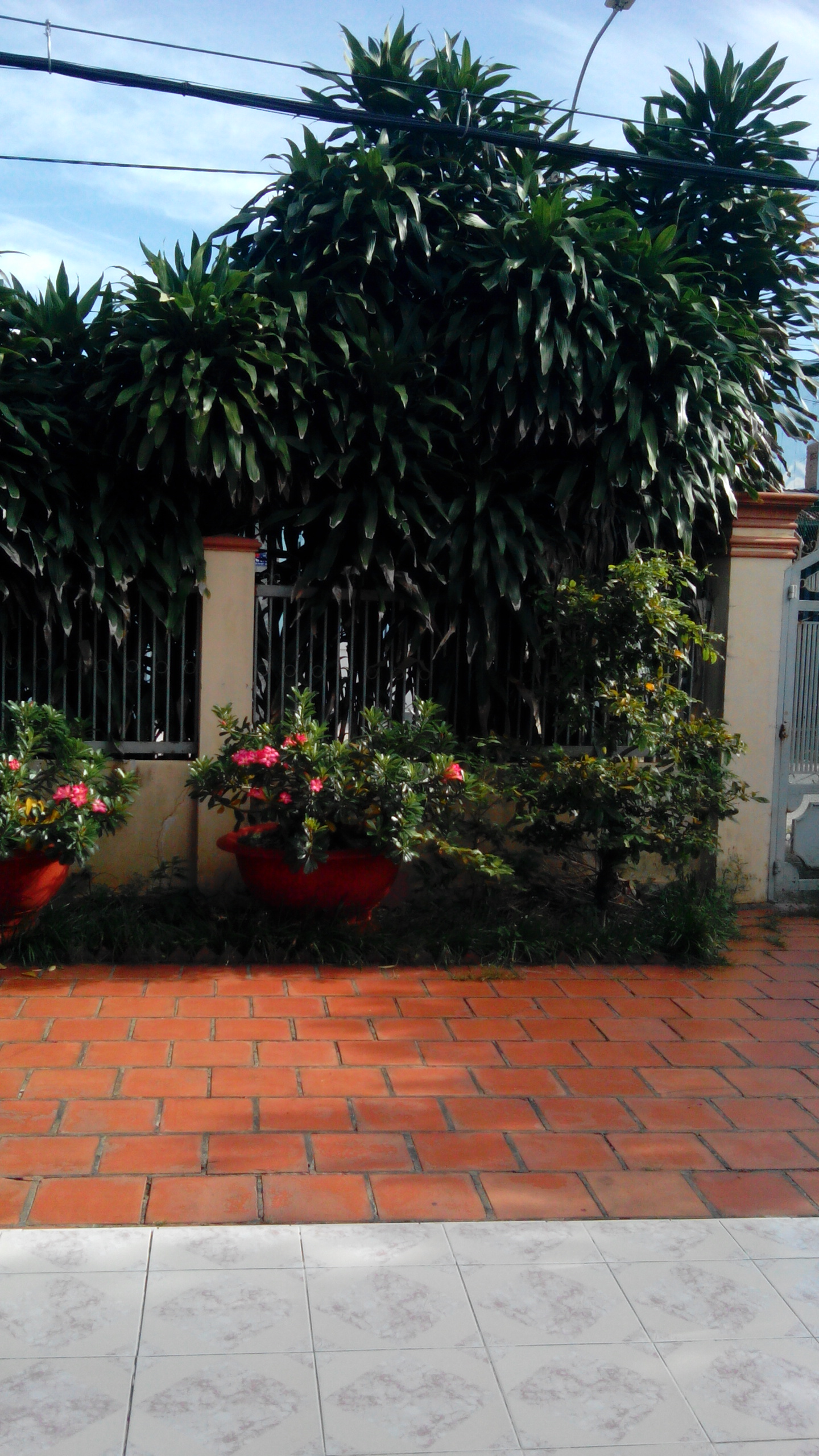 Vườn nhà tôi